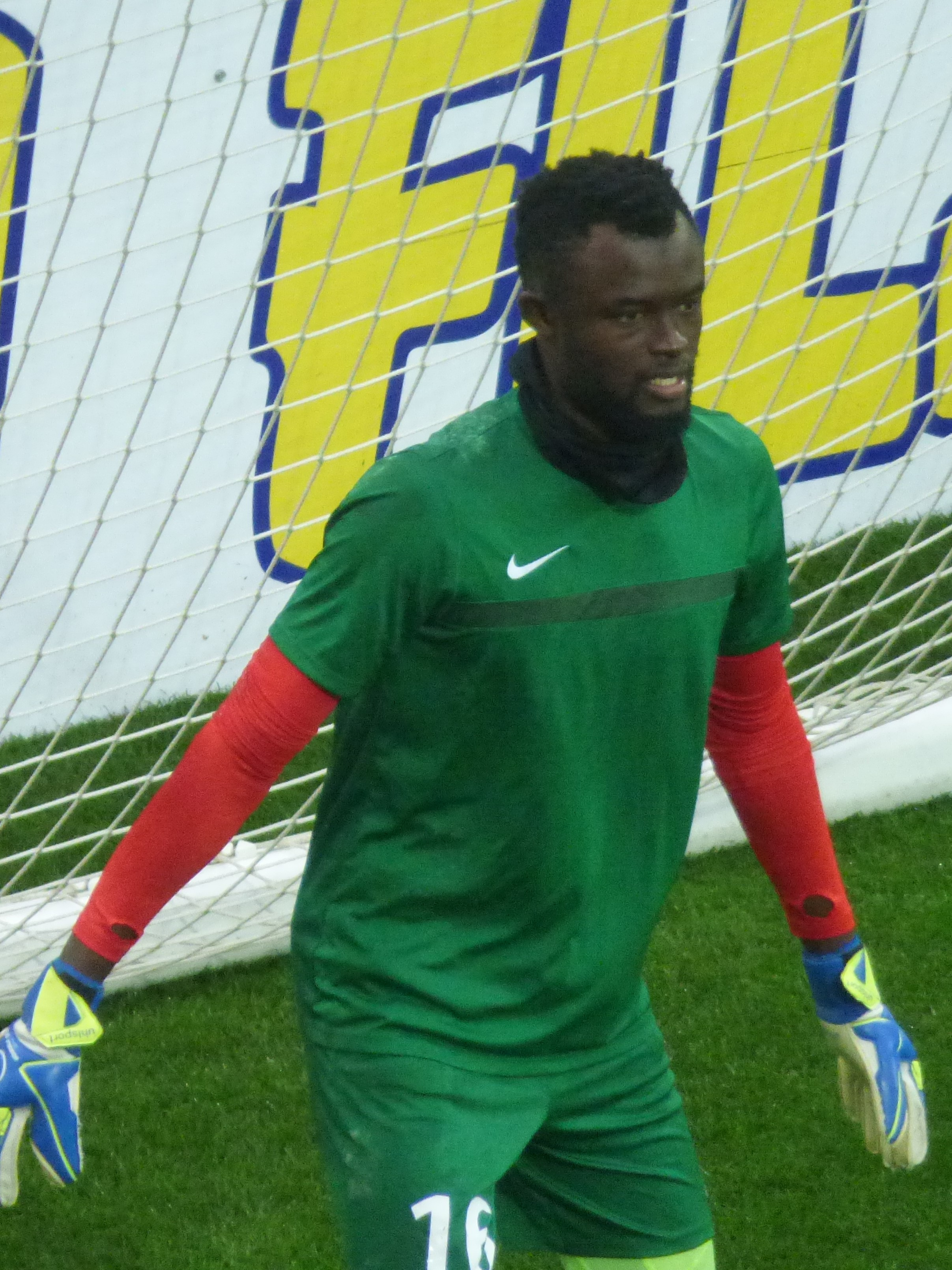 Papa Demba Camara avant le match RC Lens / Grenoble Foot 38, le 24 novembre 2018, comptant pour la quinzième journée du championnat de France de football de Ligue 2 2018-2019, au Stade Bollaert-Delelis.